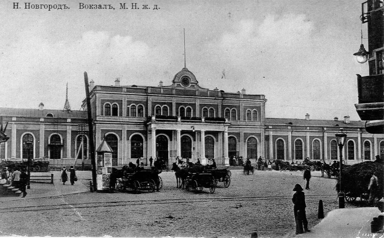 Вокзал Московско-Нижегородской ж. д. в Нижнем Новгороде. Дореволюционная открытка